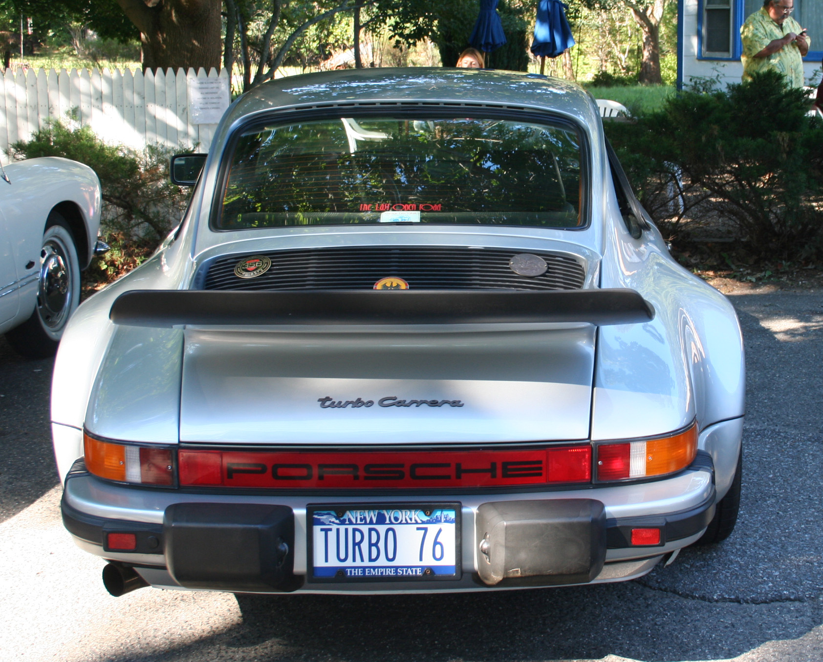 '76 Porsche Turbo in Amagansett, NY